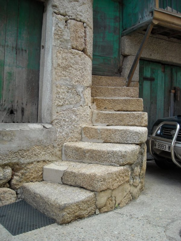 Albarellos, parroquia de Santiago de Albarellos, concello de Monterrei, provincia de Ourense. Casa con patín na rúa do forno.